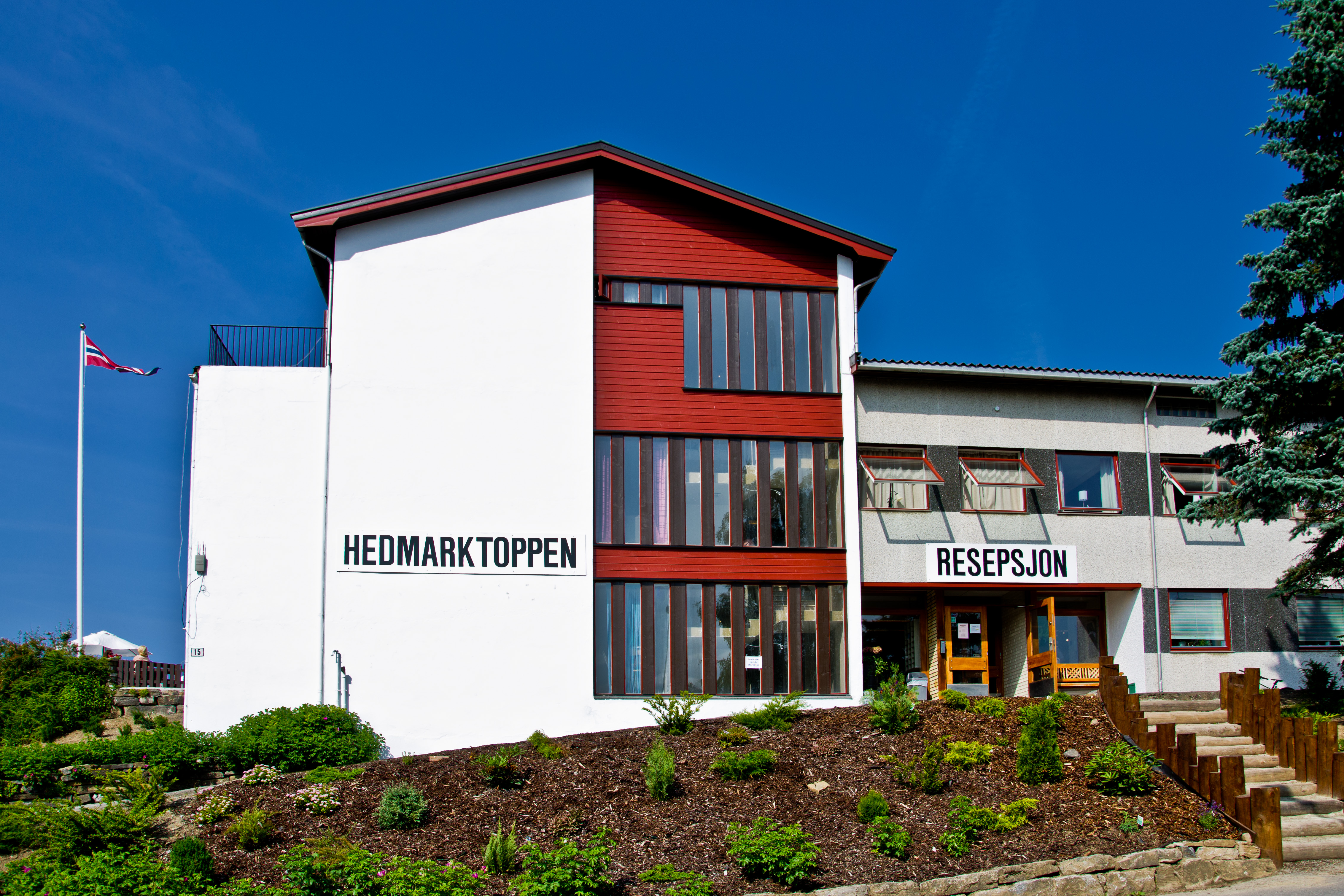 Hedmarktoppen folkehøyskole, kafeteria, sommerhotell og camping i Hamar, Hedmark, Norge.